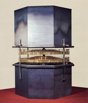 Unabhängigkeitserklärung